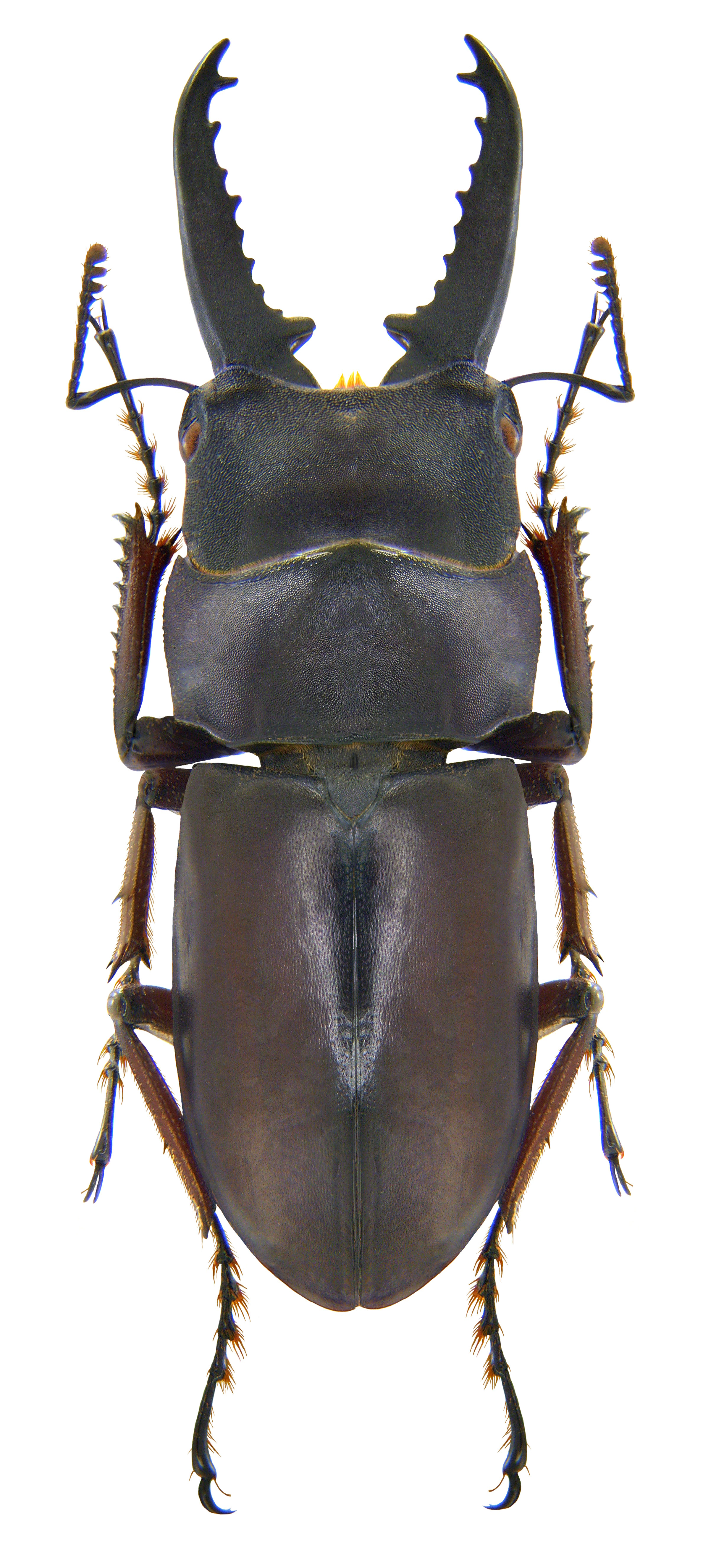 Familie: Lucanidae Groesse: 38 mm Verbreitung: Nord-Thailand, Sikkim, Nordost-Indien Fundort: Nord-Thailand, Chiang Rai, Wiangpapoa, 2007 det. A.Skale, 2009 Photo: U.Schmidt, 2009